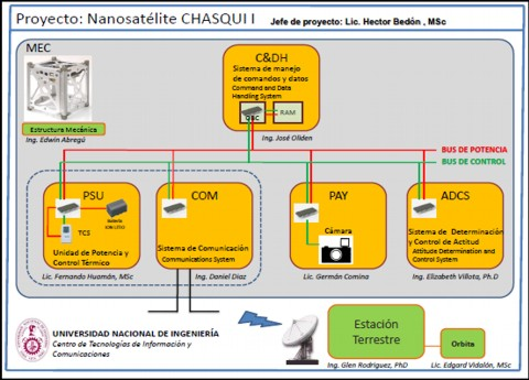 Módulos del proyecto